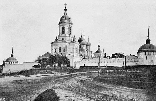 Serpukhov. Vysotsky Monastery.